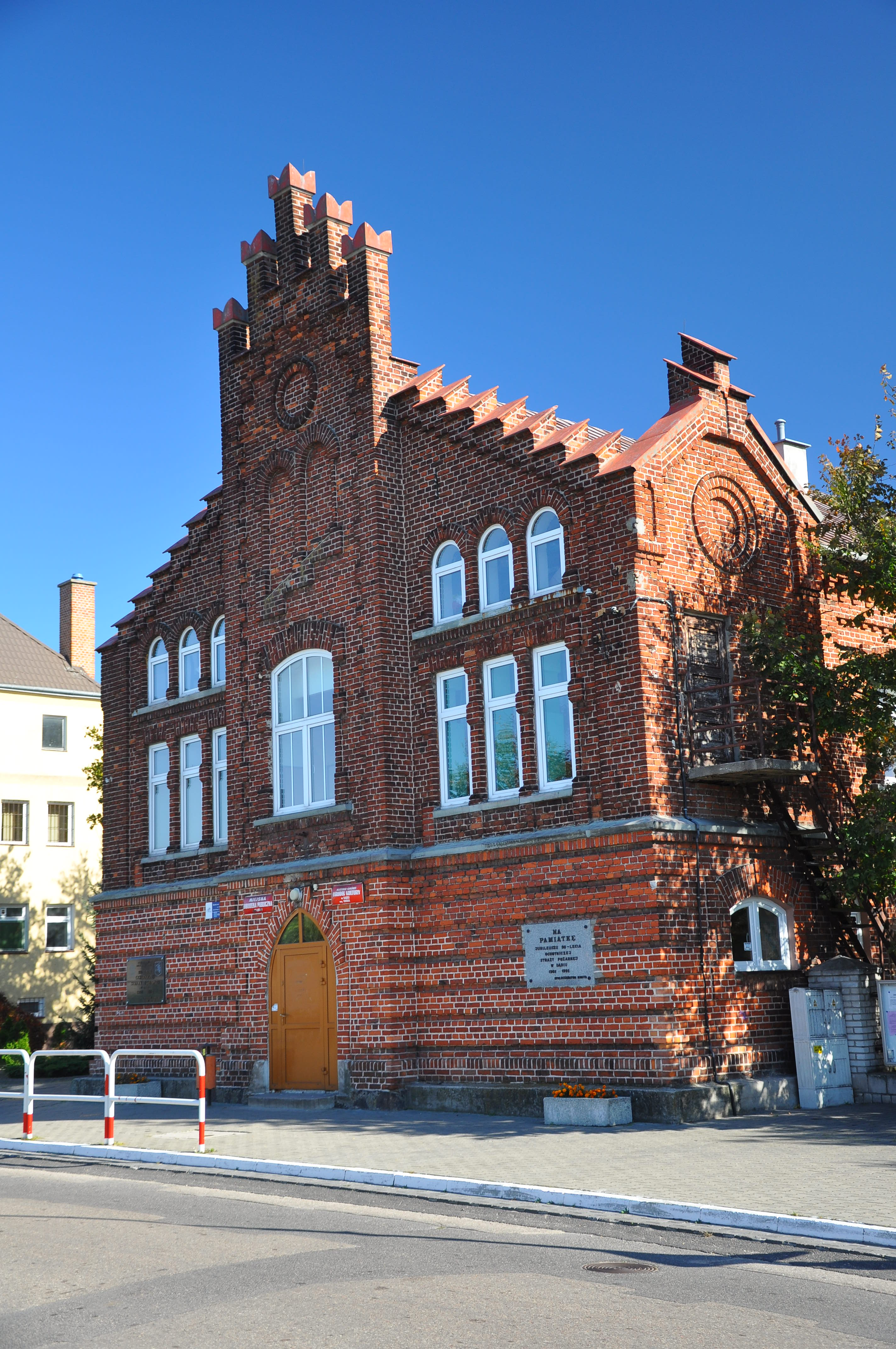 pl} Dąbie, ul. 1-go Maja 2, Dąbie